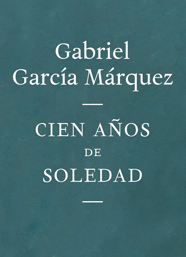 Fragmento de la portada de Cien años de Soledad publicada en 2017 por la editorial Random.